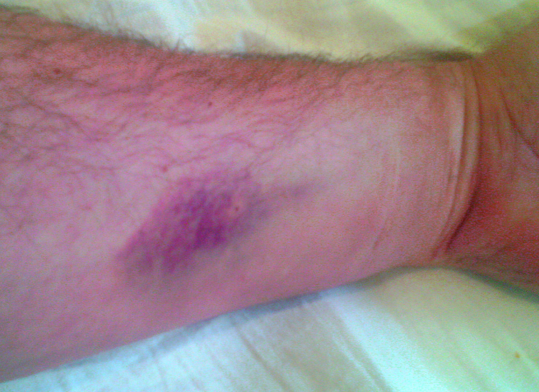 Гематома (синяк) в результате непопадания иглы в вену при установке каппельницы. Впрочем, вероятнее всего, причиной этого могло стать то, что пациент сам неловко повернул руку во время процедуры (например во сне).